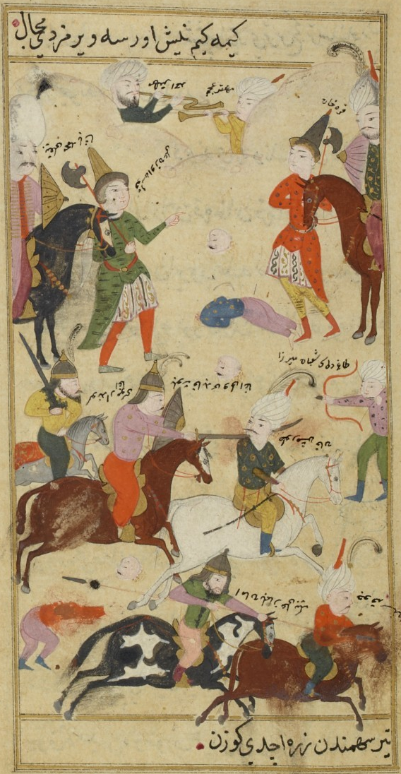 Koçhisar Muharebesi'nin Tacü't-Tevarih'de yer alan minyatürü. Sol üstteki atlı Bıyıklı Mehmet Paşa, sağ üstteki atlı ise Ustaclu Kara Han